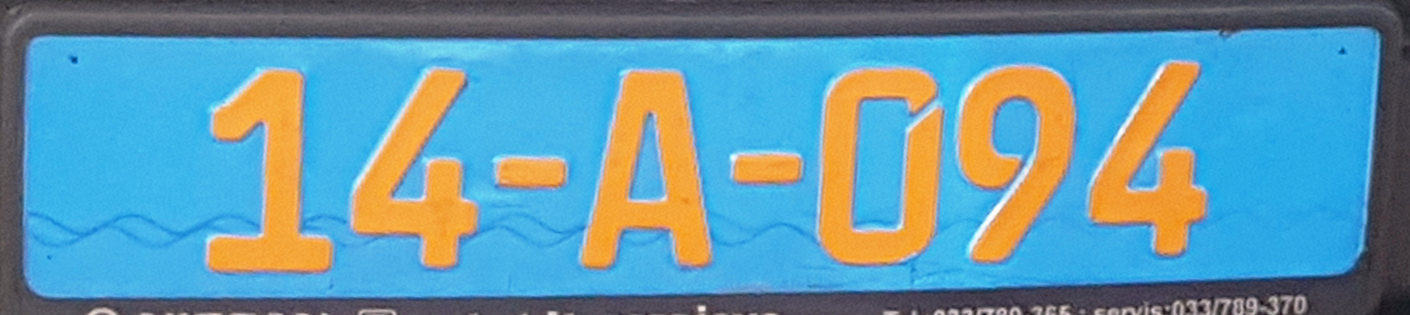 CD kentekenplaat van Bosnia and Herzegovina (Turkije)